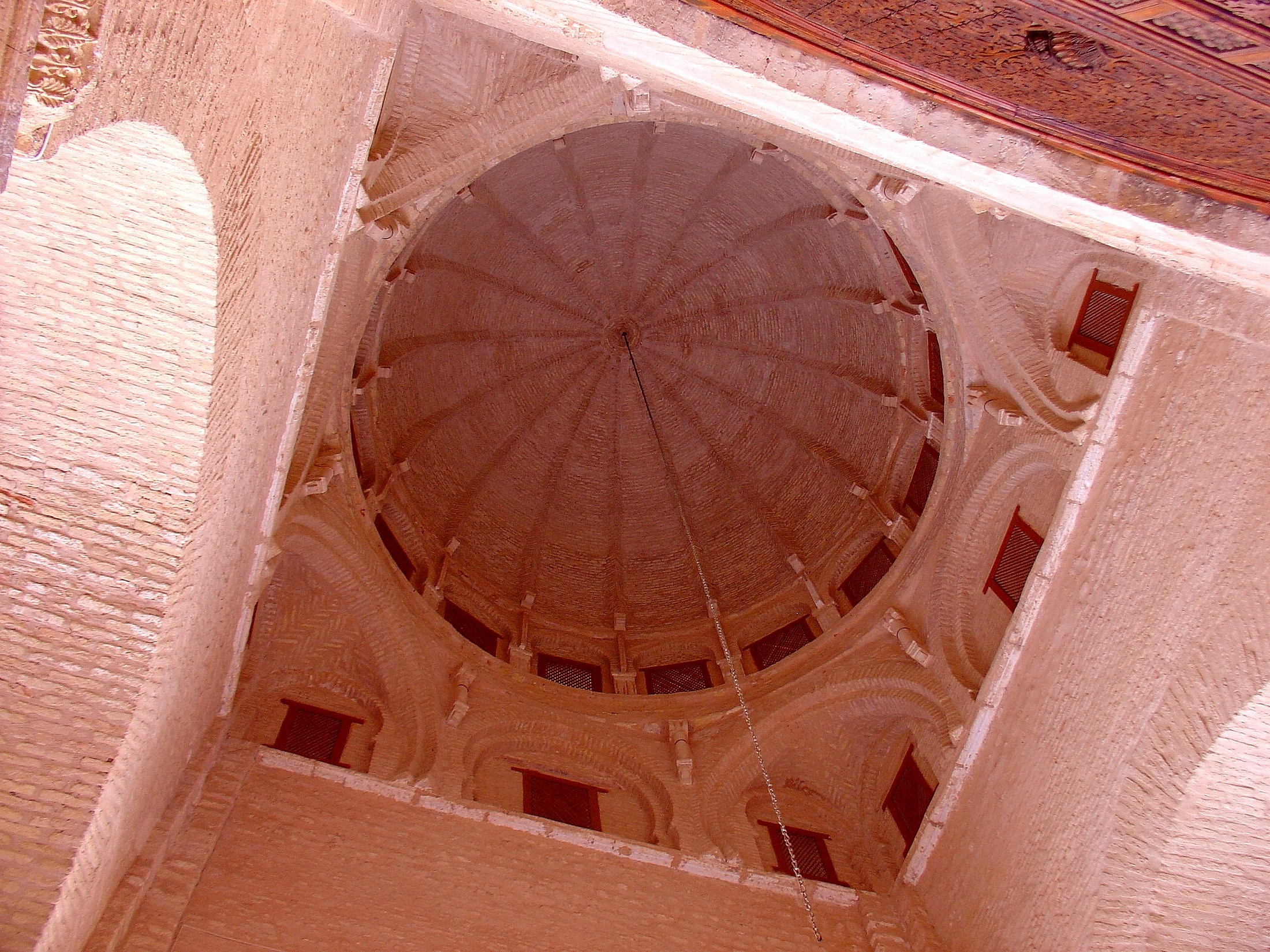 Dôme de la Grande mosquée de Kairouan